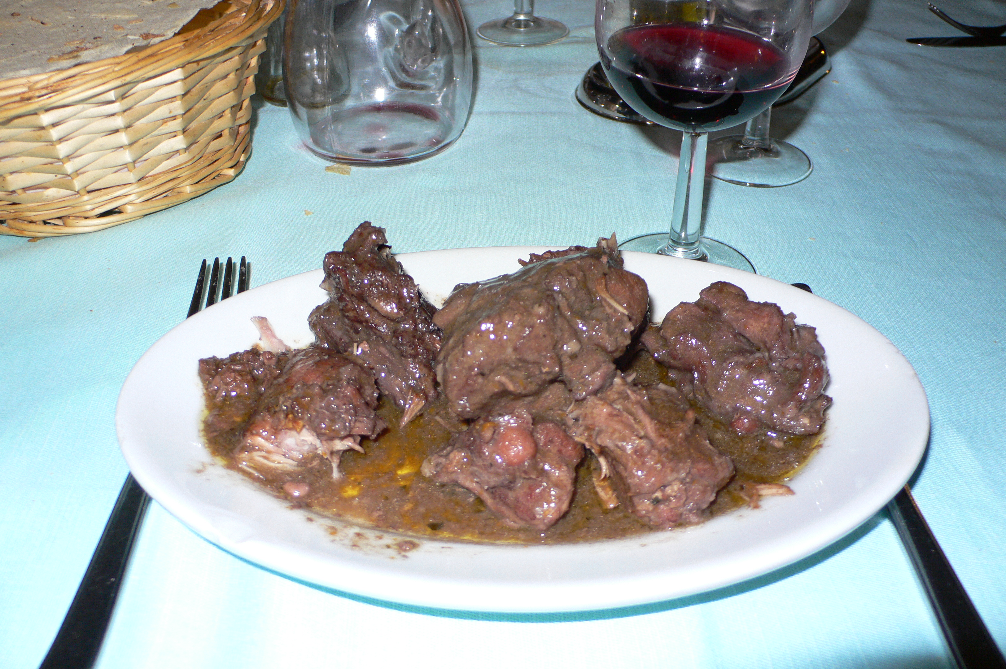 Civet de lapin en Sardaigne